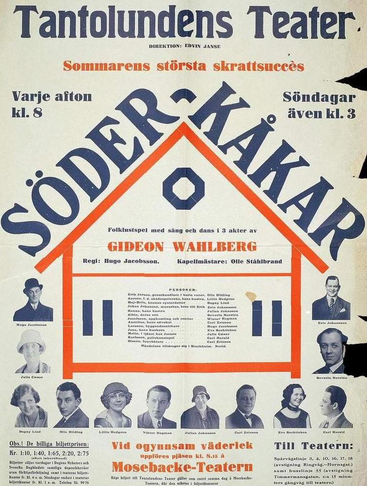 Affisch Tantolundens Friluftsteater 1930 ger "Söderkåkar"